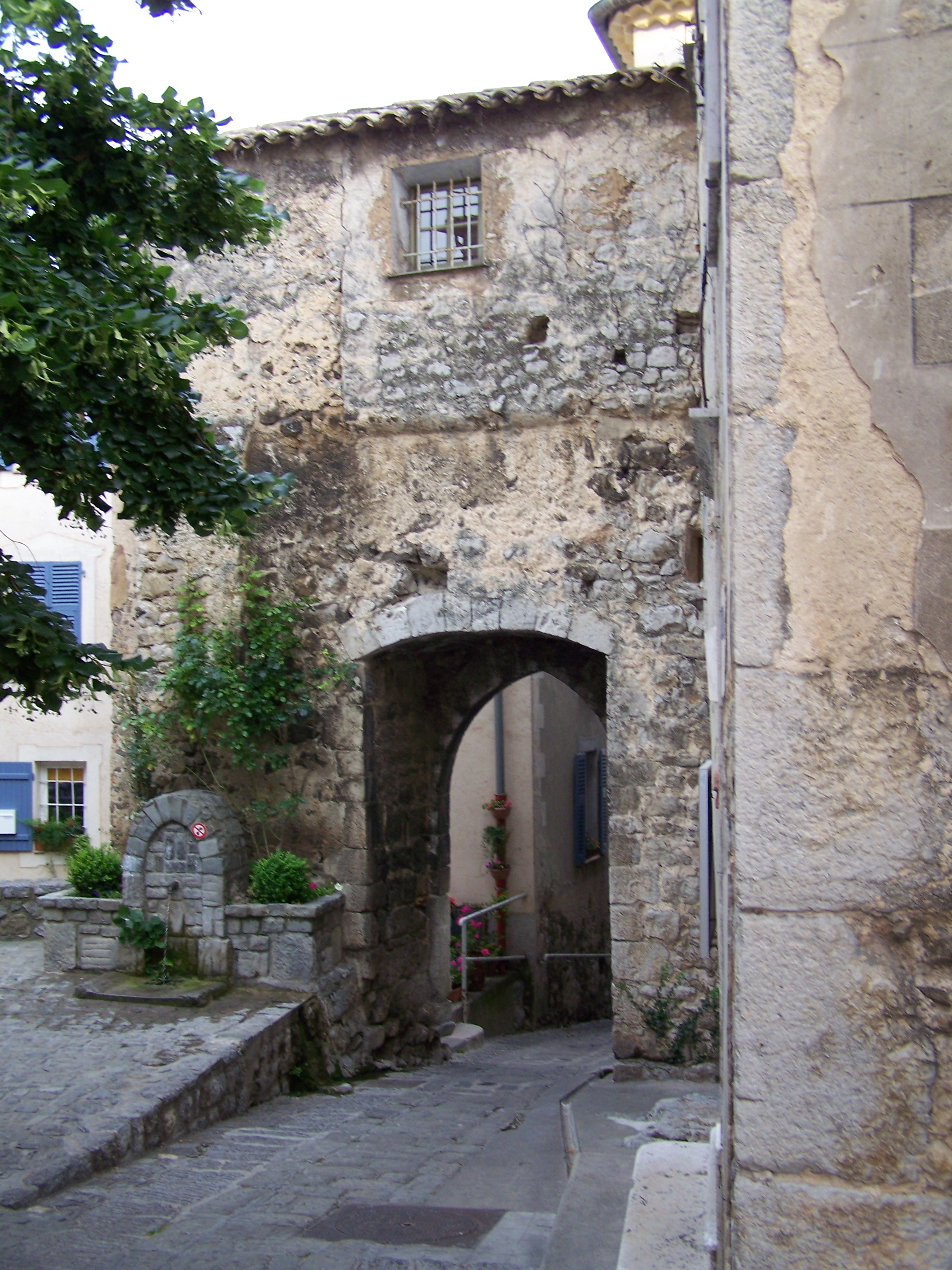 Porte médiévale du village de Levens (Alpes-Maritimes, France) à côté de la maison du Portal